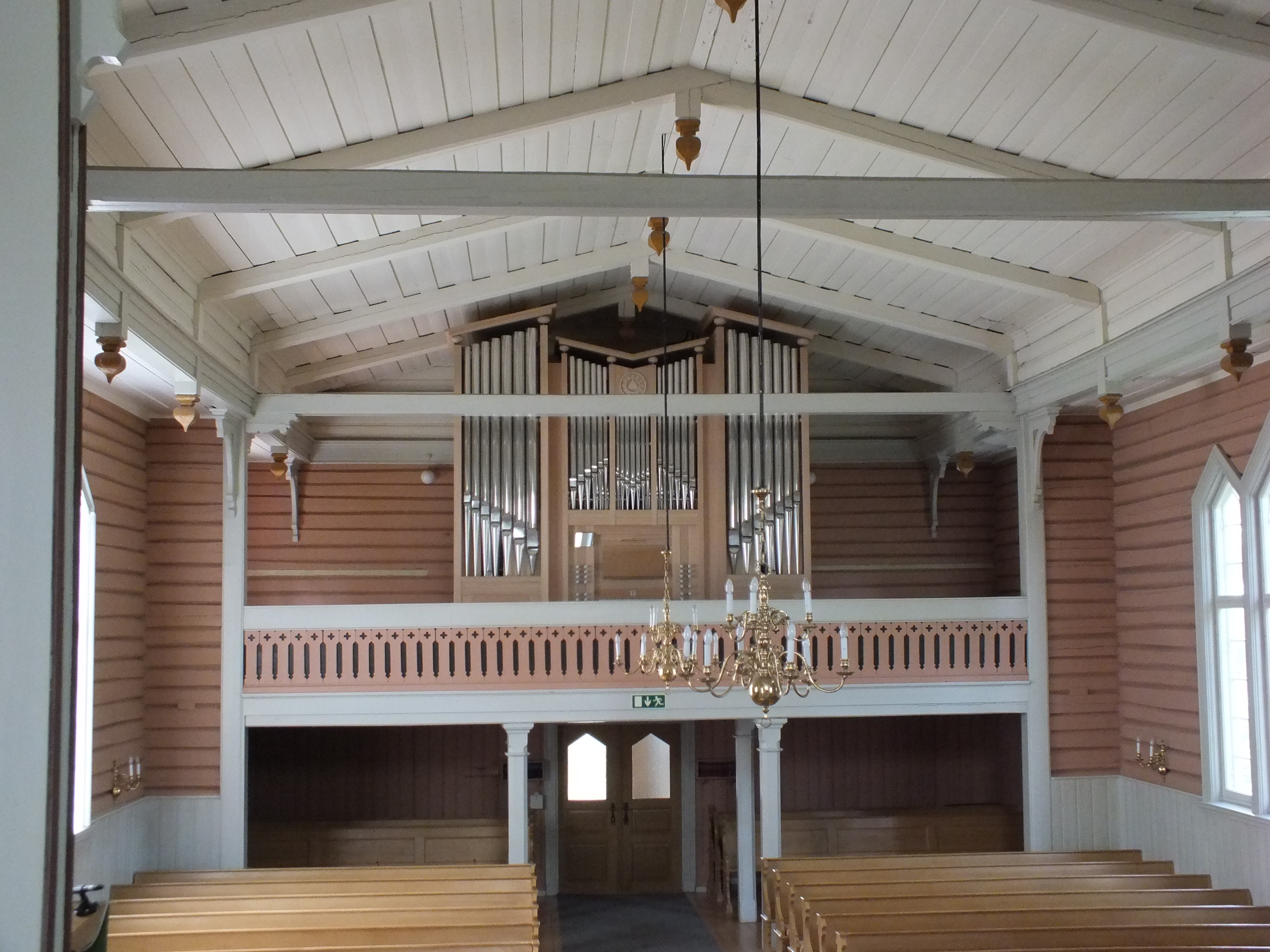 Sandtner-Orgel von 2013